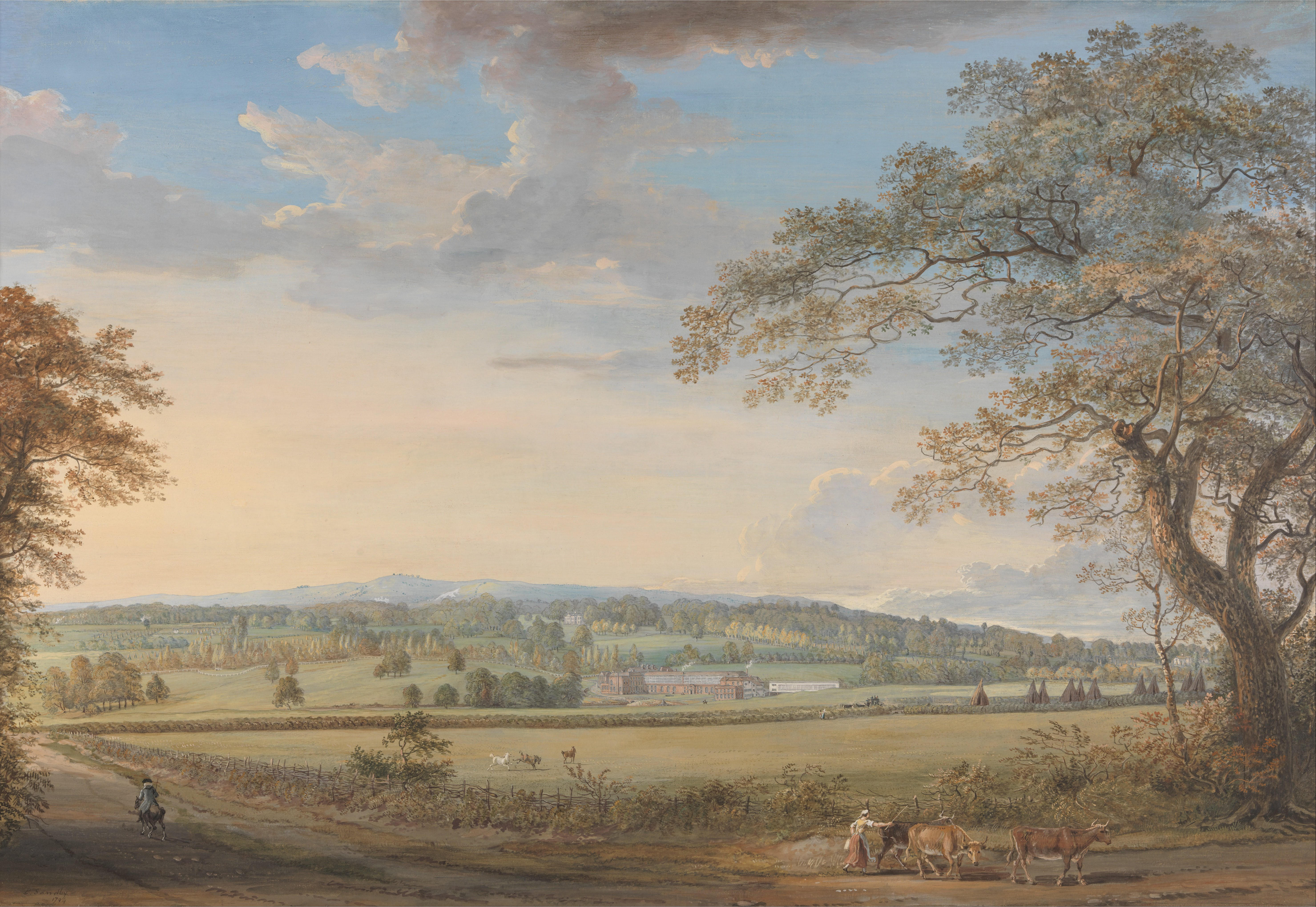 Landscape